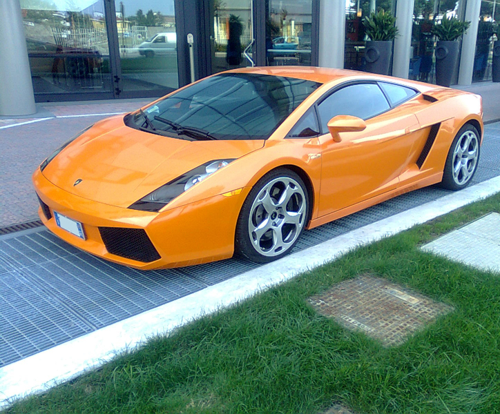 Una lamborghini gallardo